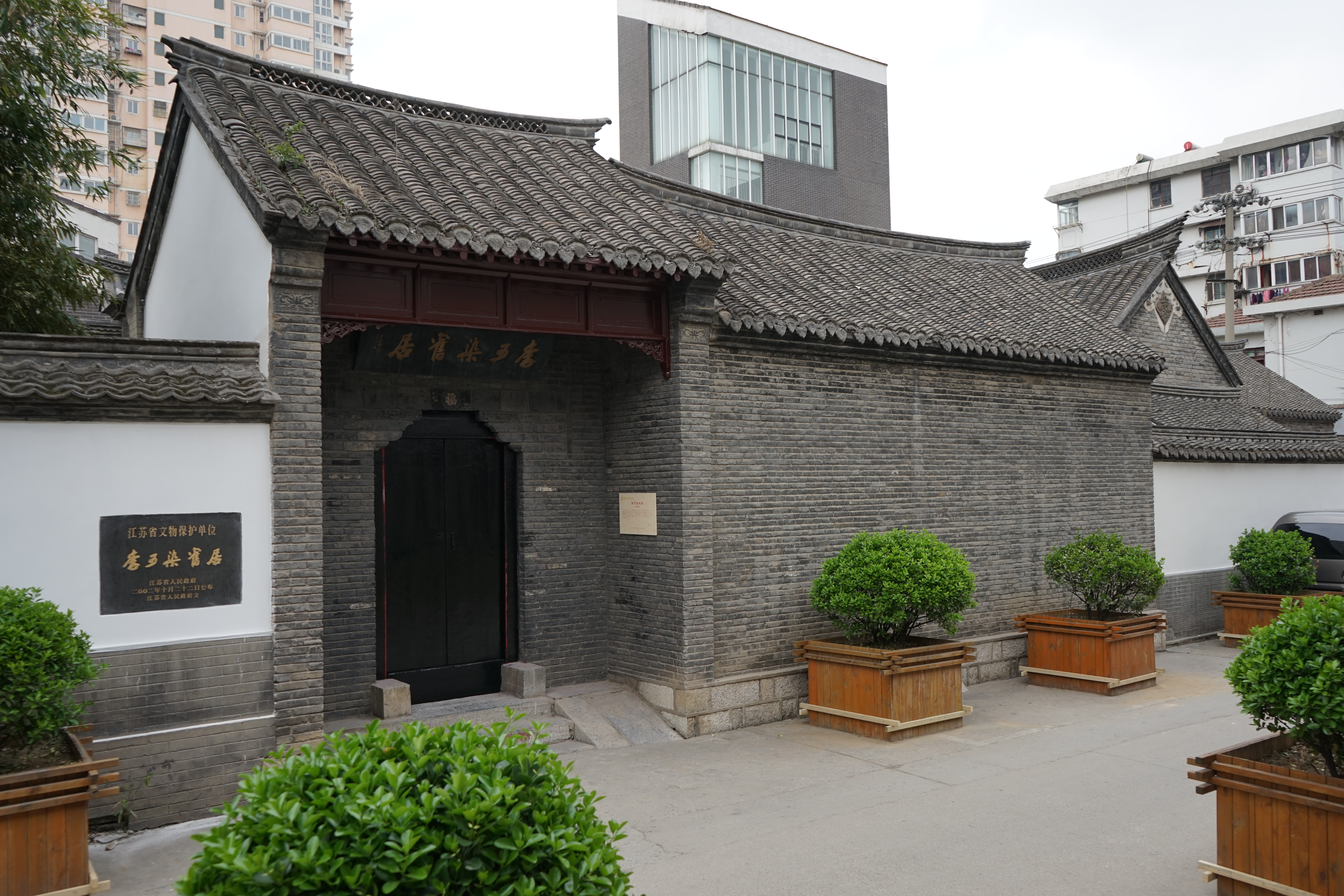 中文（中国大陆）: 李可染故居